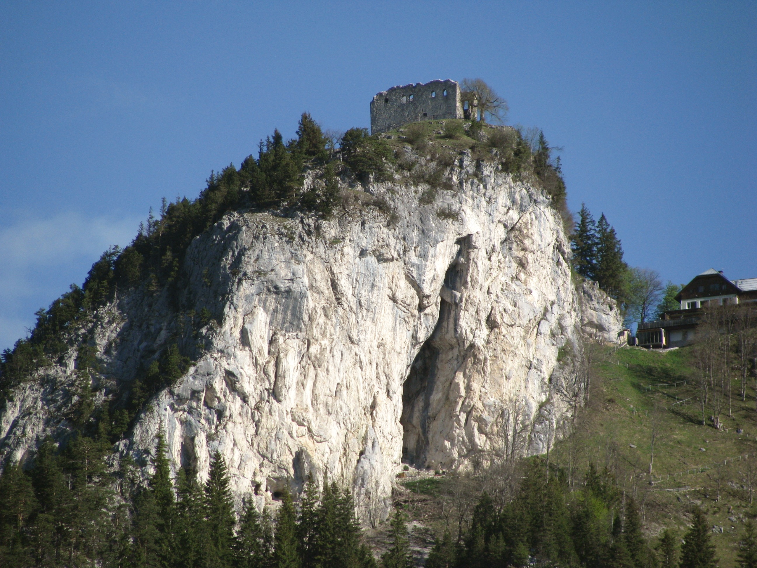 Burgruine Falkenstein, darunter die Mariengrotte